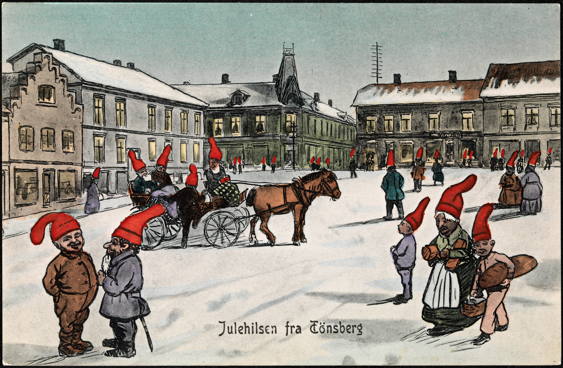 Tittel / Title: Julehilsen fra Tönsberg, 1908 Motiv / Motif: Postkort / julekort. Dato / Date: 1908 Kunstner / Artist: ukjent / unknown Utgiver / Publisher: Fredrik Winsnes Sted / Place: Vestfold, Tønsberg Eier / Owner Institution: Nasjonalbiblioteket / National Library of Norway Lenke / Link: Bildesignatur / Image Number: blds_04548